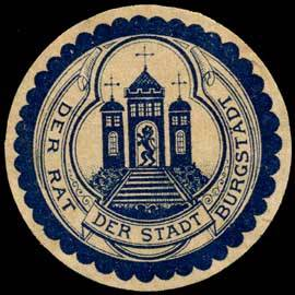 Siegelmarke Stadtrat Burgstädt